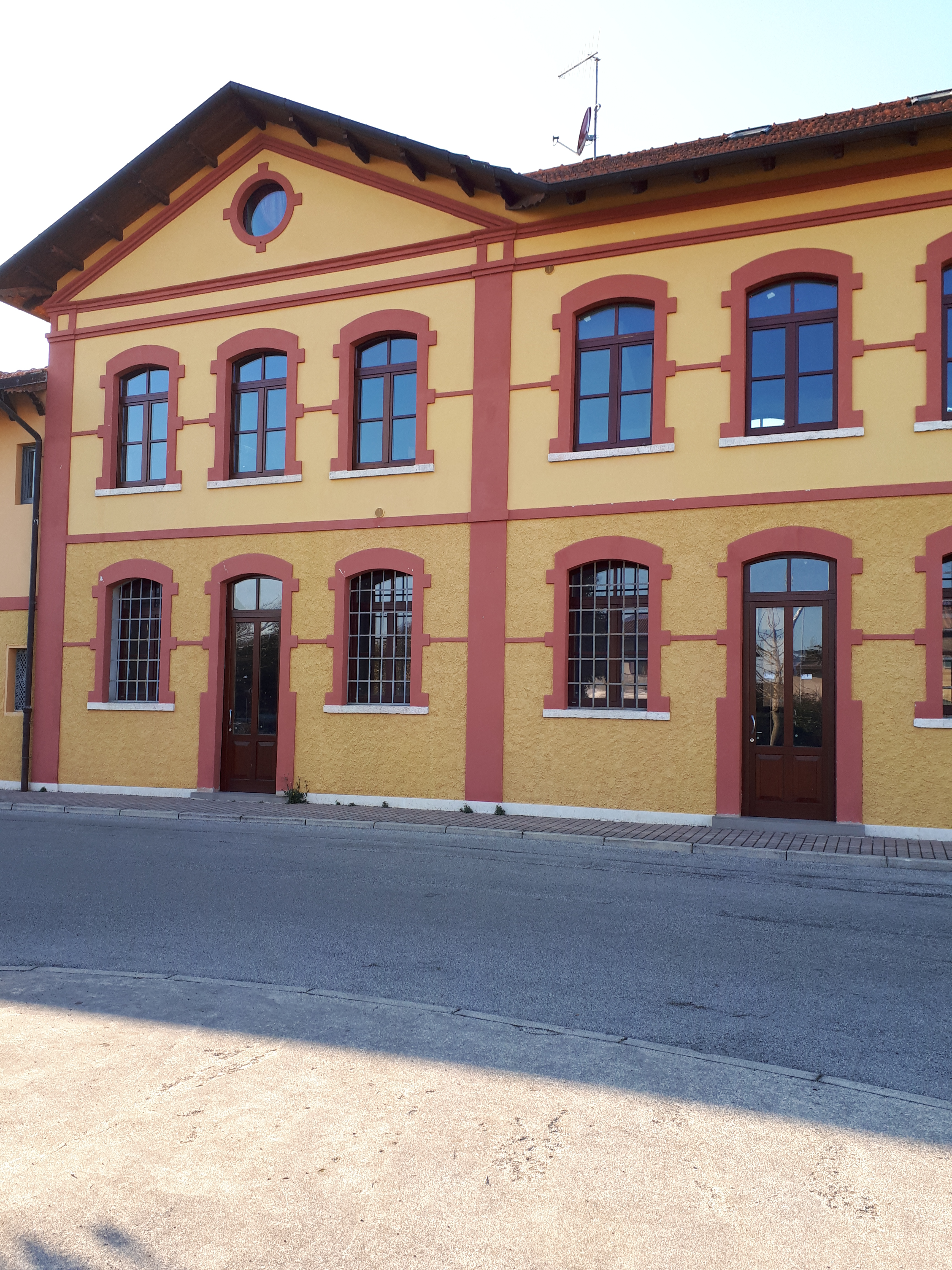 Particolare della facciata lungo via Riboli del lanificio Cazzola